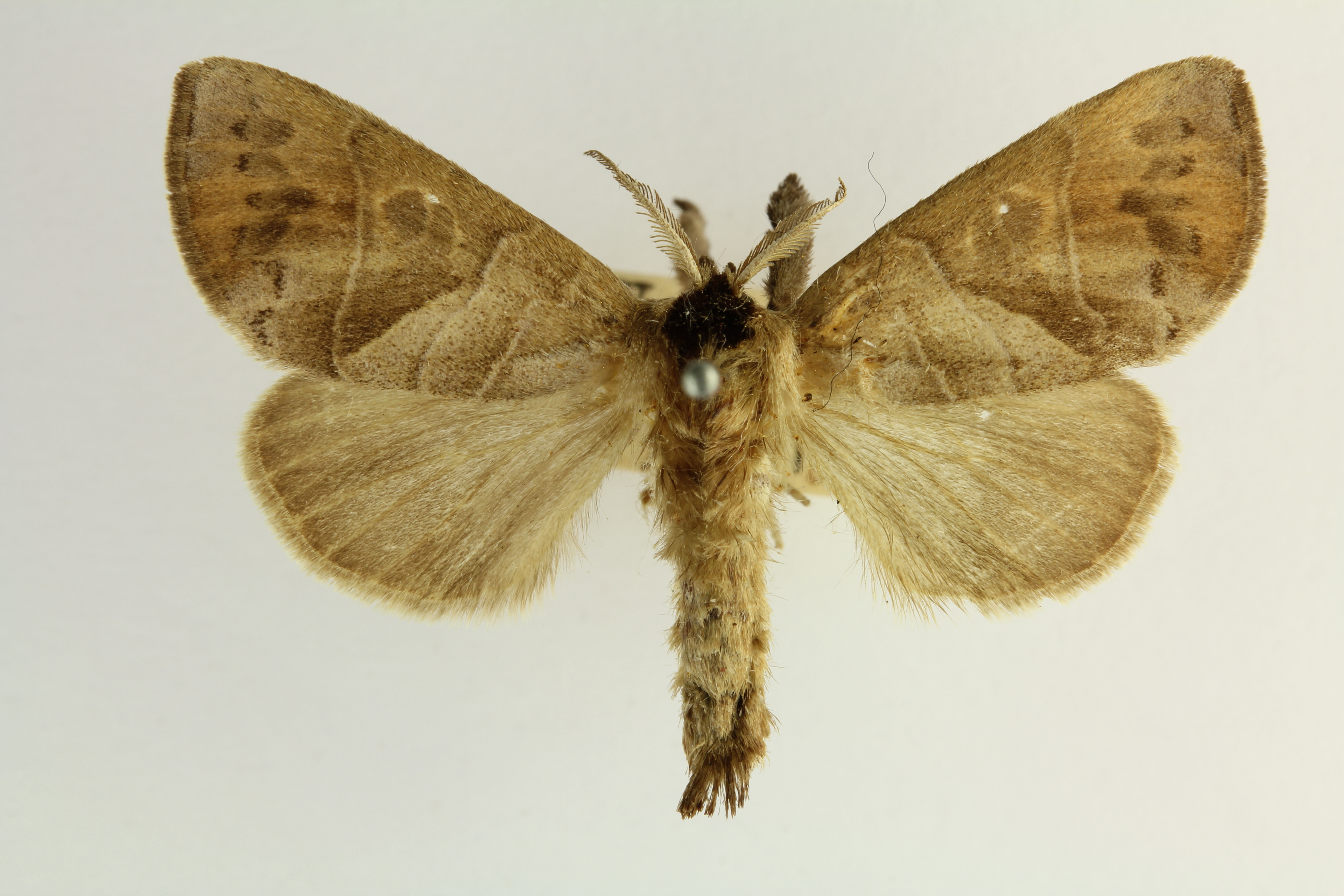 Notodontidae of Sweden.Insect collections SLU, Uppsala